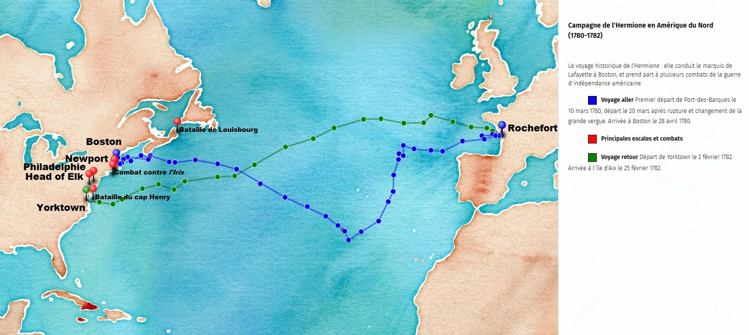 Parcours de la frégate française l'Hermione, sous le commandement de Latouche, de mars 1780 à février 1782, d'après les positions données dans le livre de bord.